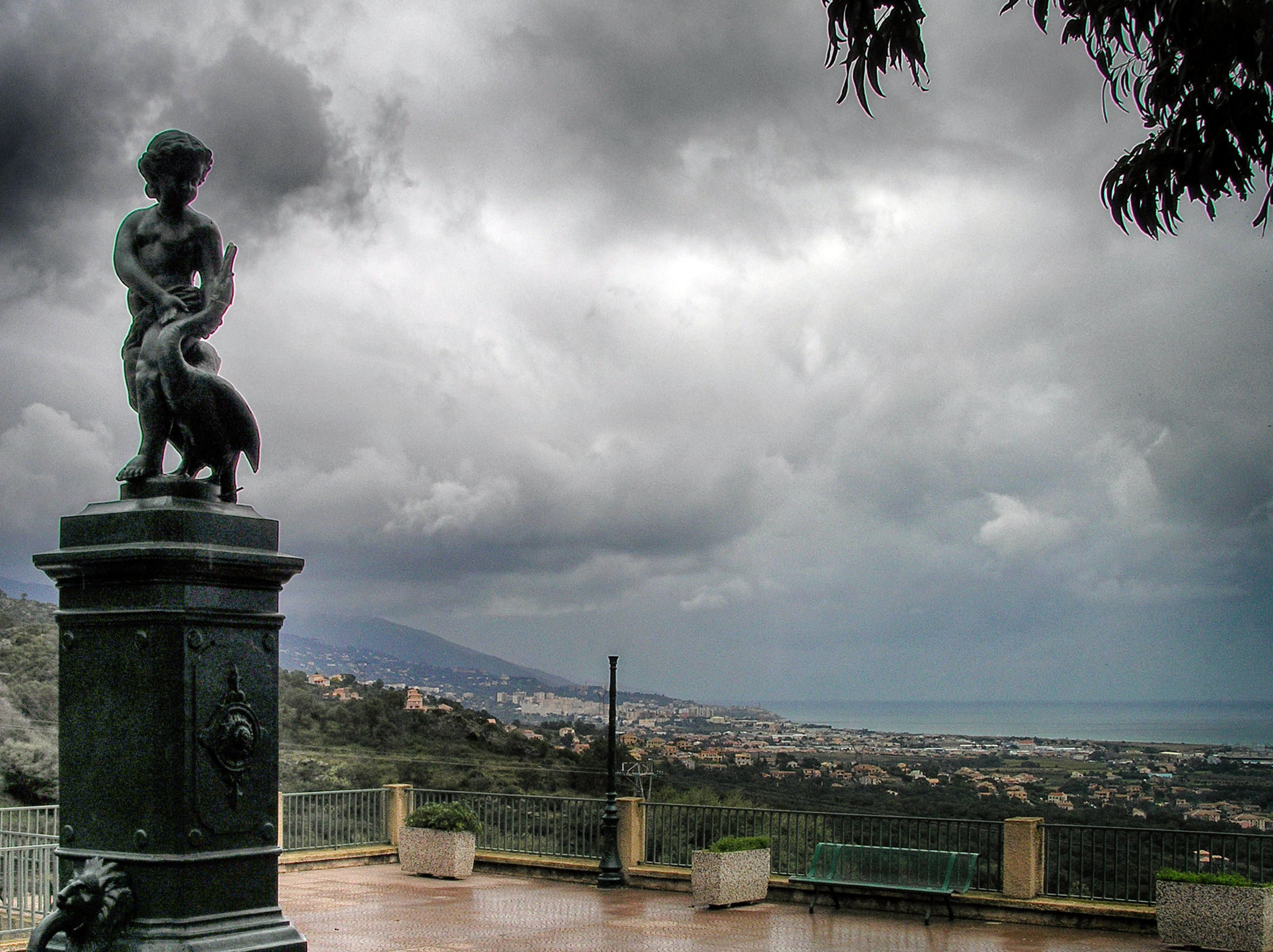 Biguglia, agglomération bastiaise (Haute-Corse) - Piazza di l'Olmu au nord du village. Elle est ornée d'une statue en bronze Enfant à l'oie. On aperçoit le sud de l'agglomération bastiaise avec les immeubles de Montesoro.